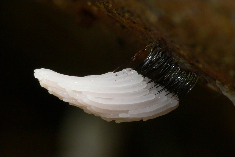 Schleimpilz (Stemonitis axifera)